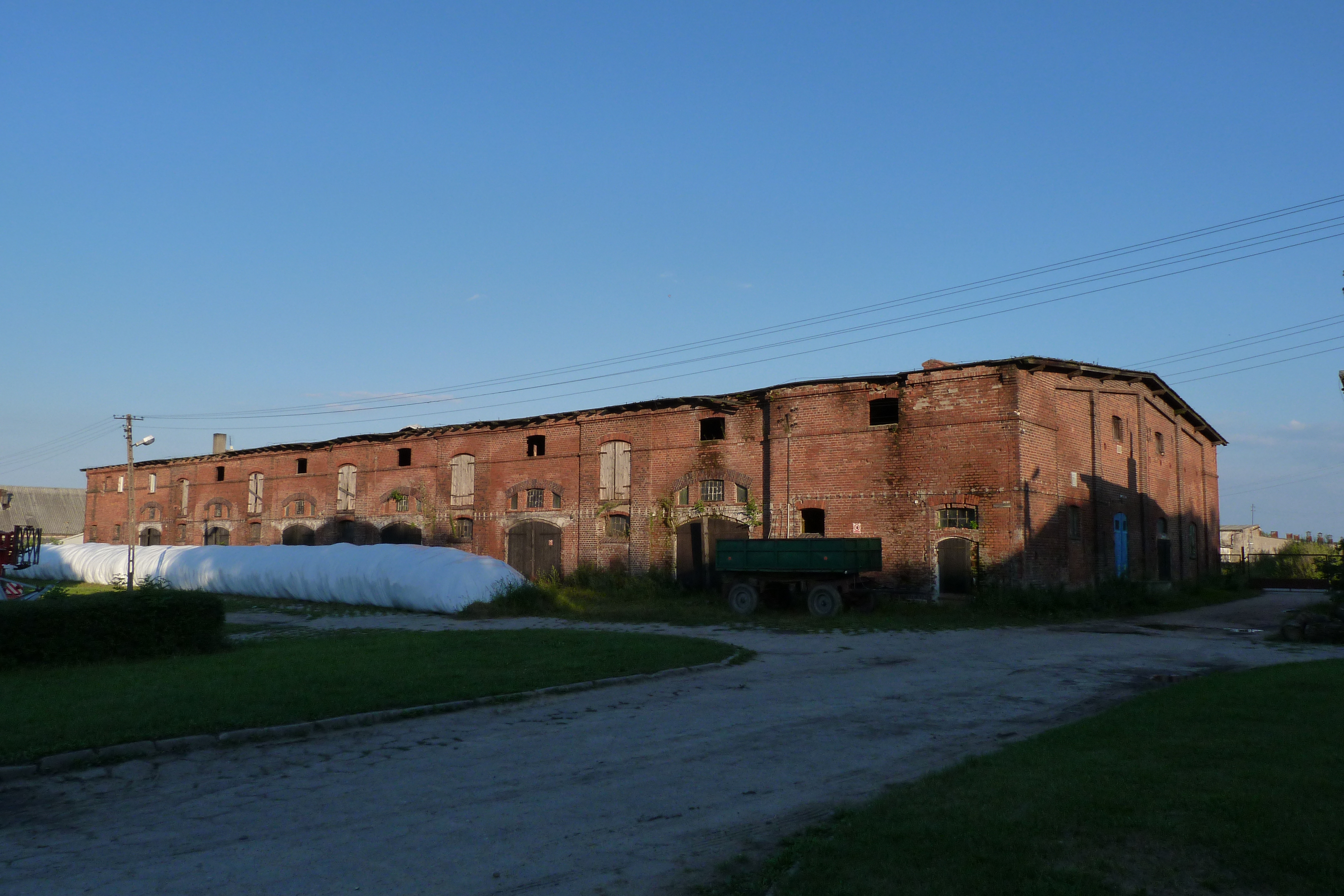 Obora z XIX wieku stanowiąca część założenia folwarcznego